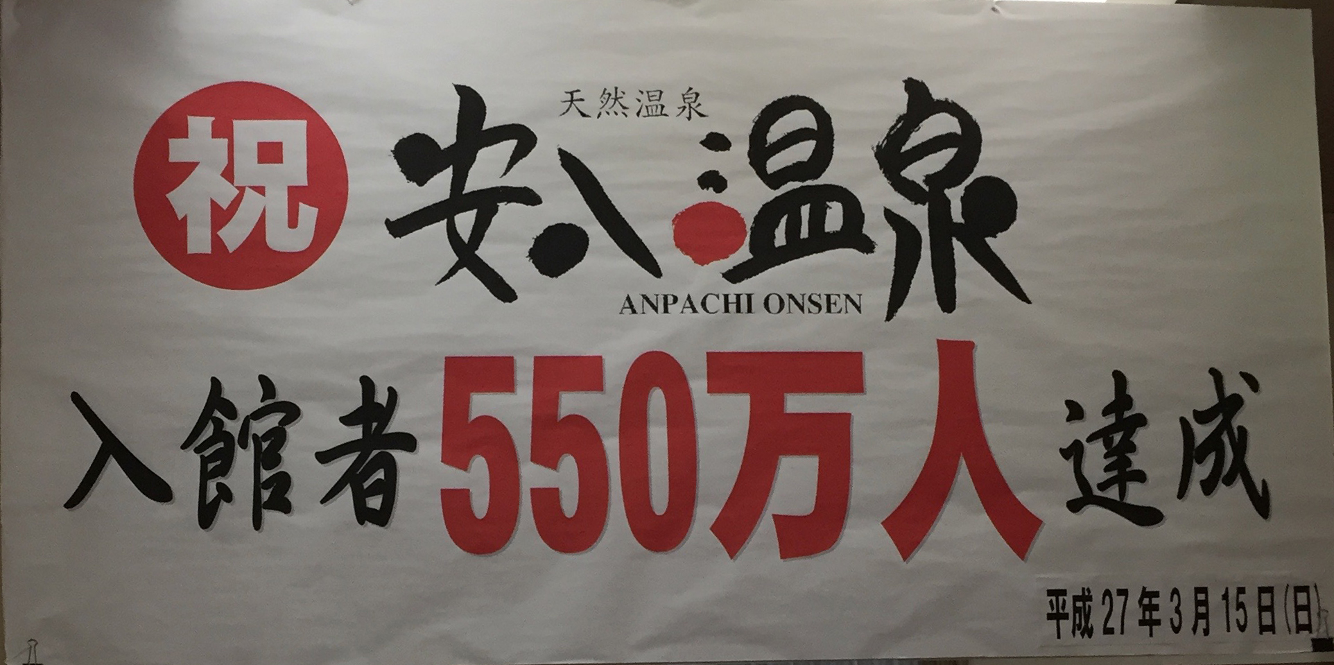 安八温泉550万人入場達成記念の垂れ幕